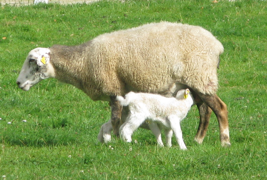 Une brebis (ovis aries) de race romane INRA 401 allaite son agneau, bergerie nationale de Rambouillet.